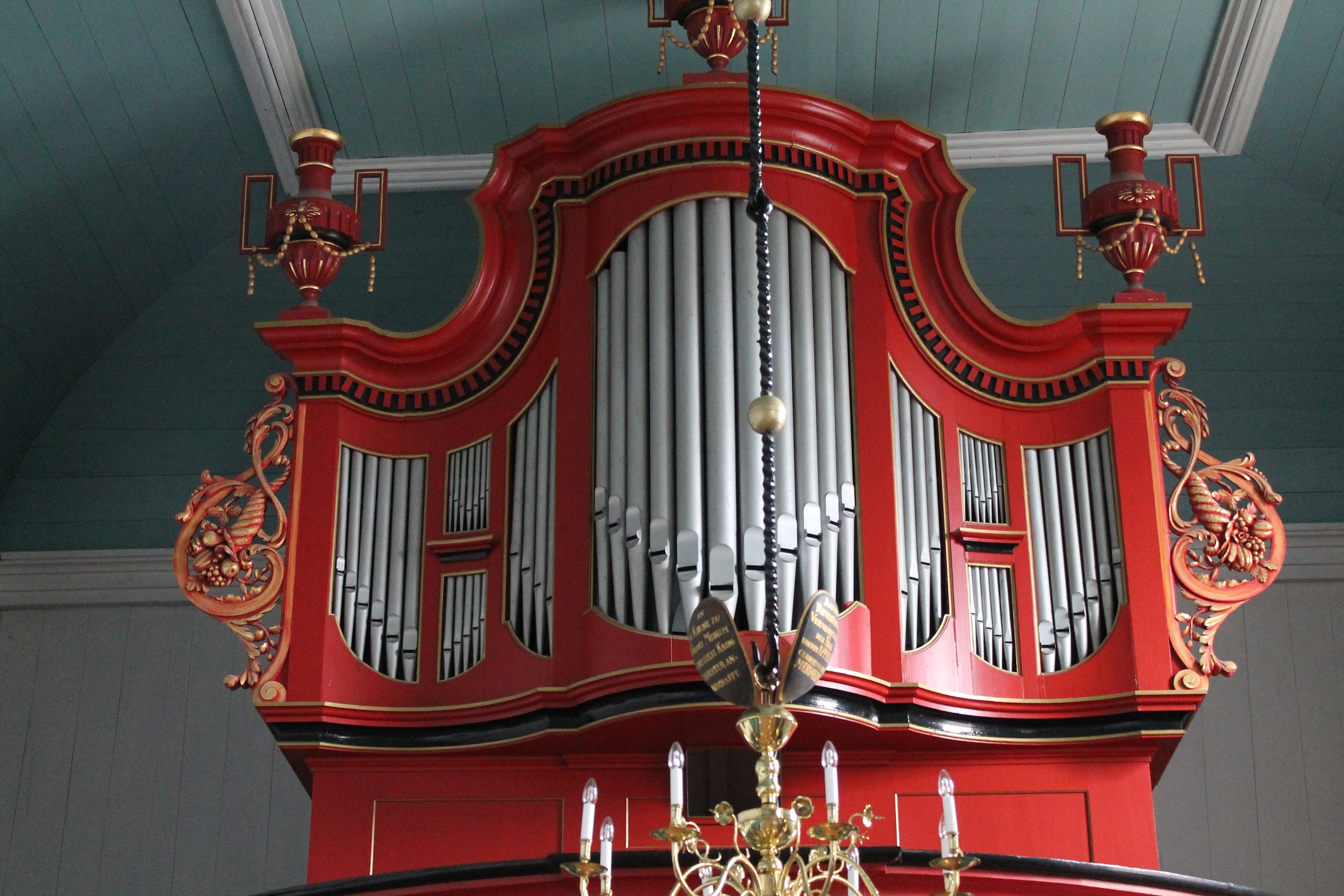 Orgel der Groß Midlumer Kirche, Ostfriesland, Niedersachsen, Deutschland